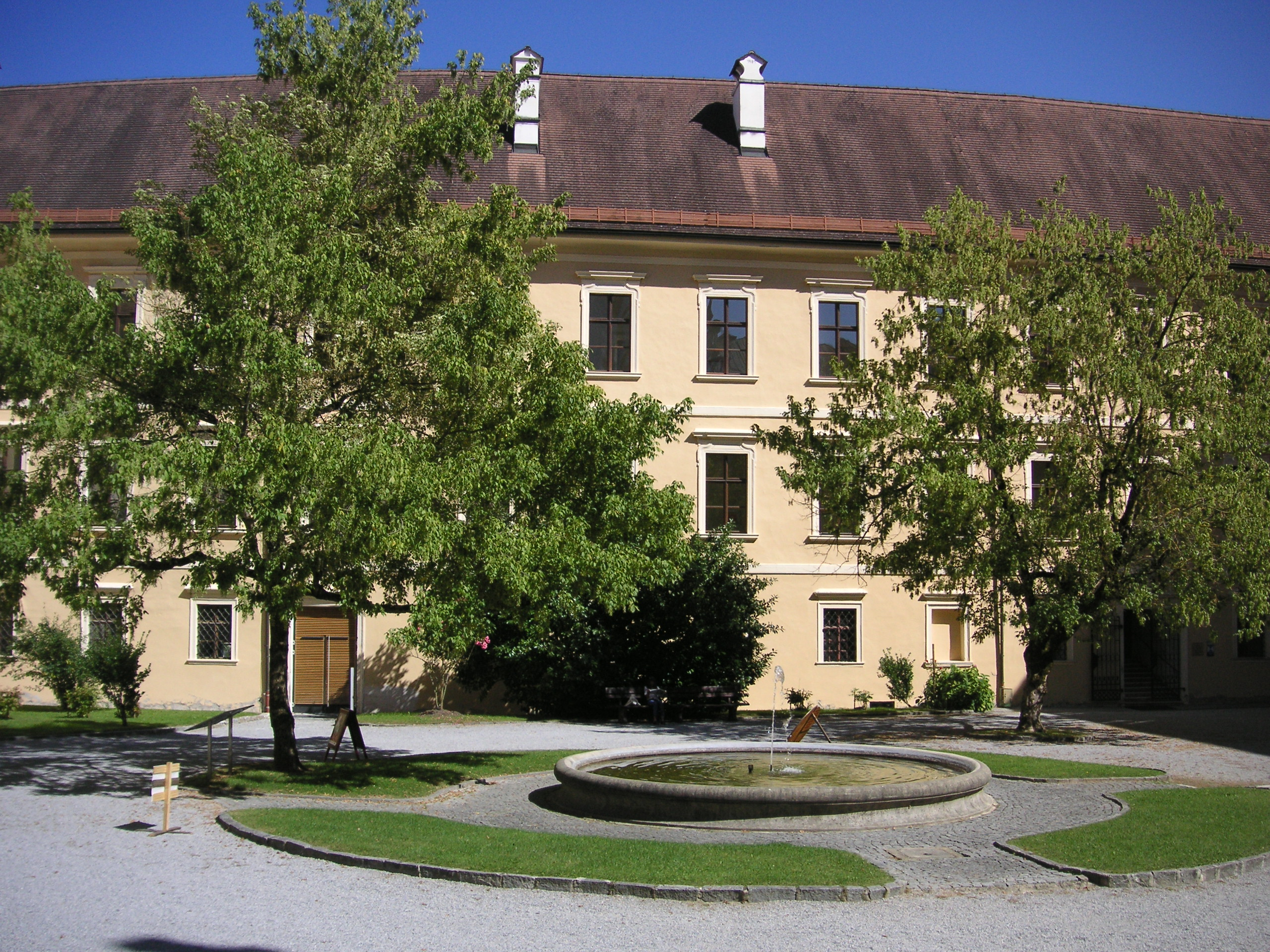 Gebäude mit dem Sitz der Verwaltung und dem Cellarium des Stiftes Rein